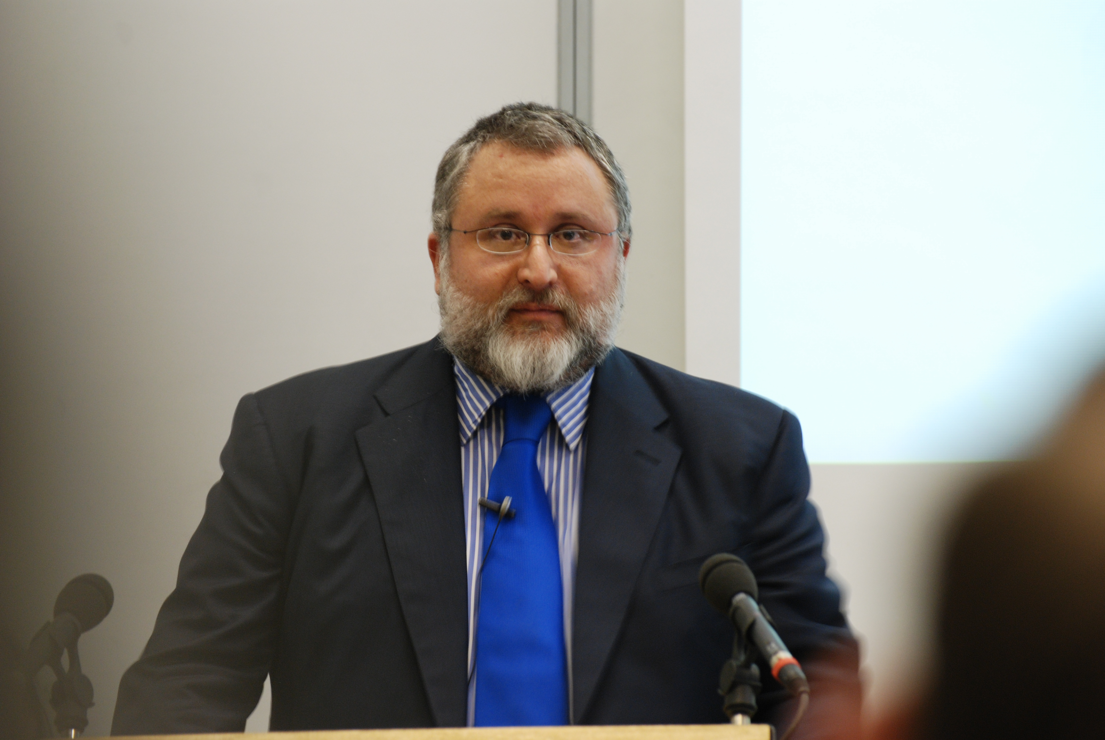 Eben Moglen